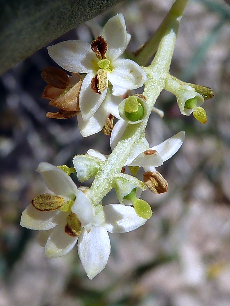 Oliva europaea (Olivo) : Flores, detalle - La Huerta, Albatera (Provincia de Alicante, España).